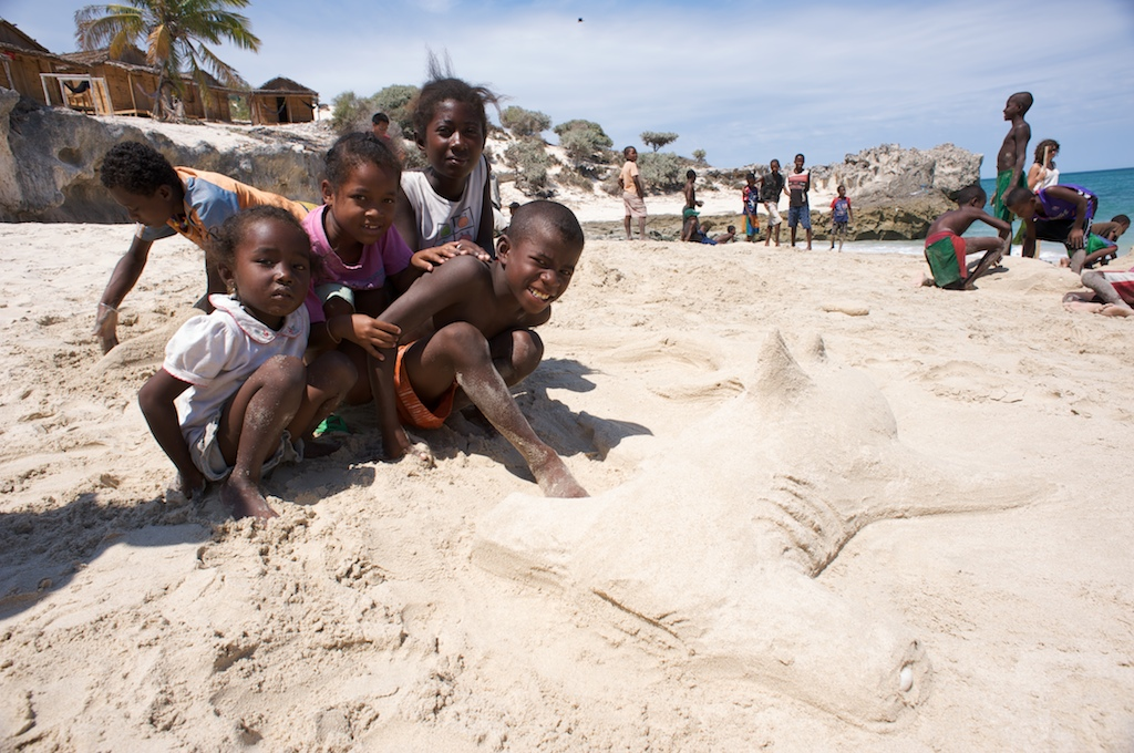 Andavadoaka